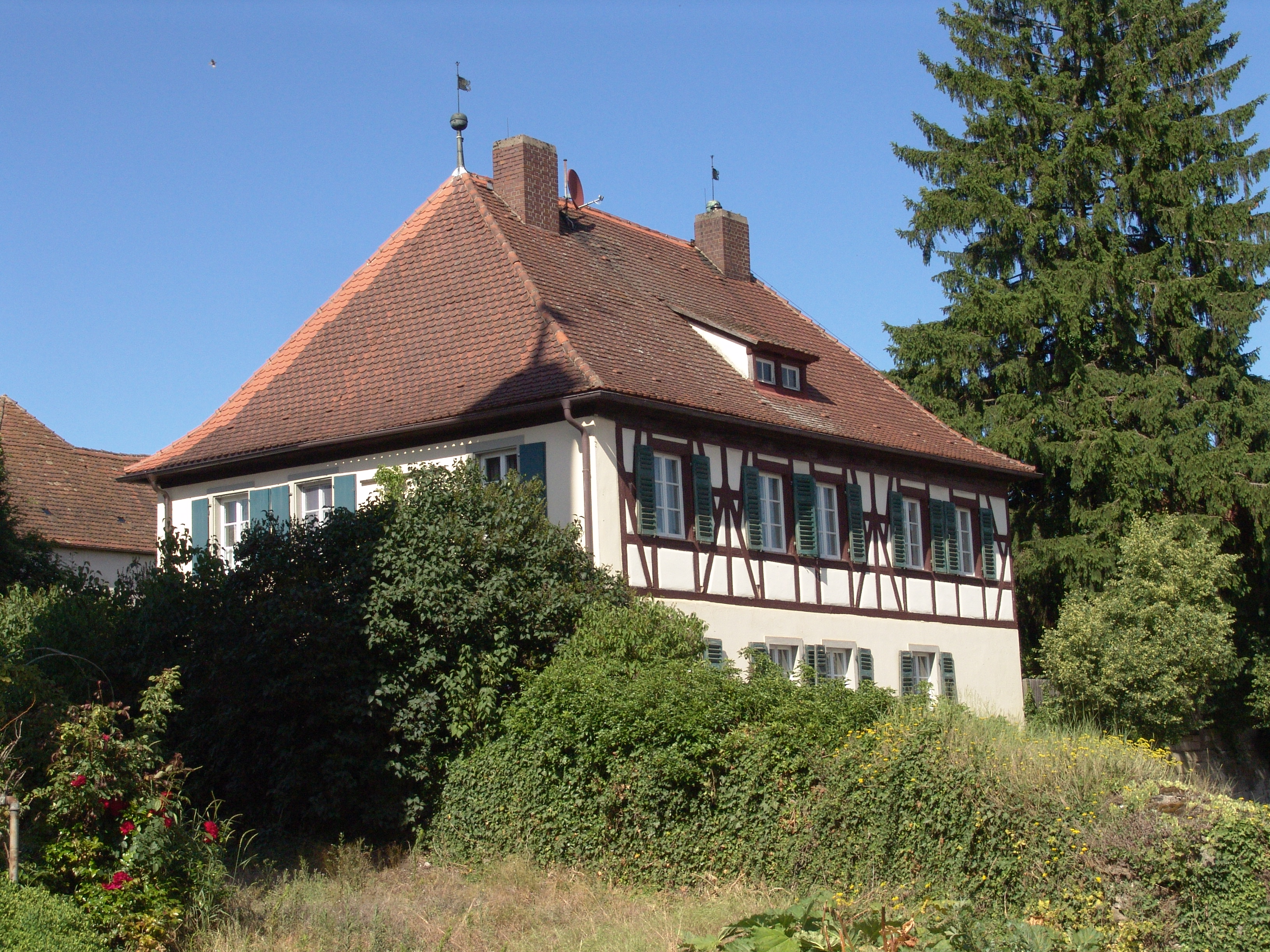 Baudenbach Evangelisches Pfarrhaus